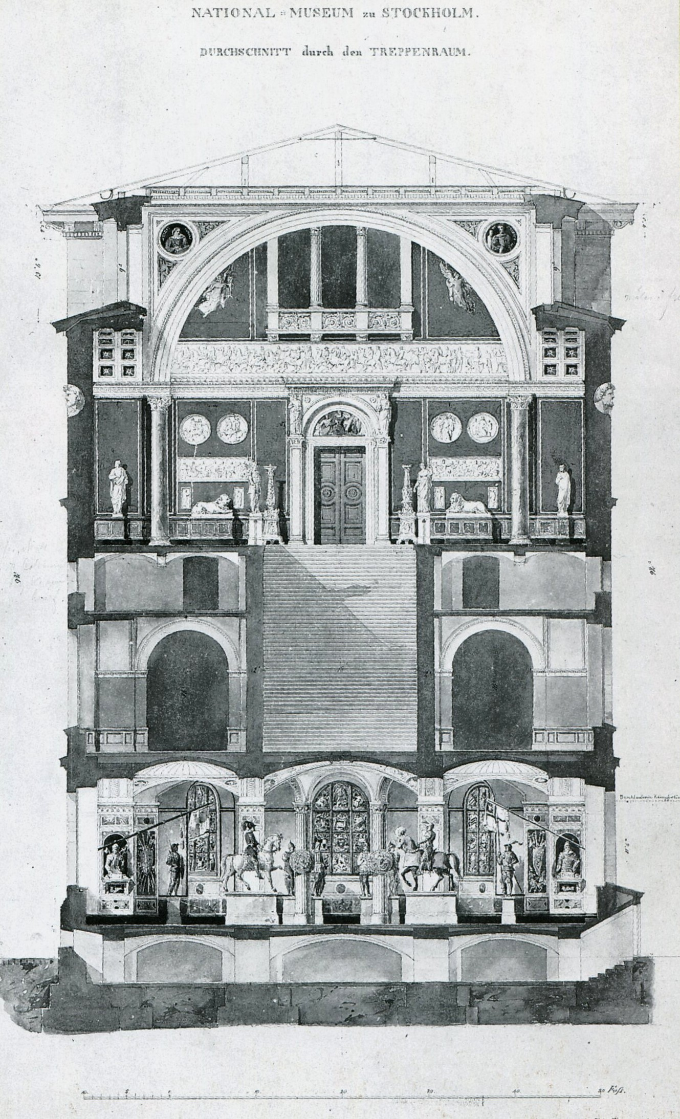 Nationalmuseum, Stockholm: "Durchschnitt durch den Treppenraum"